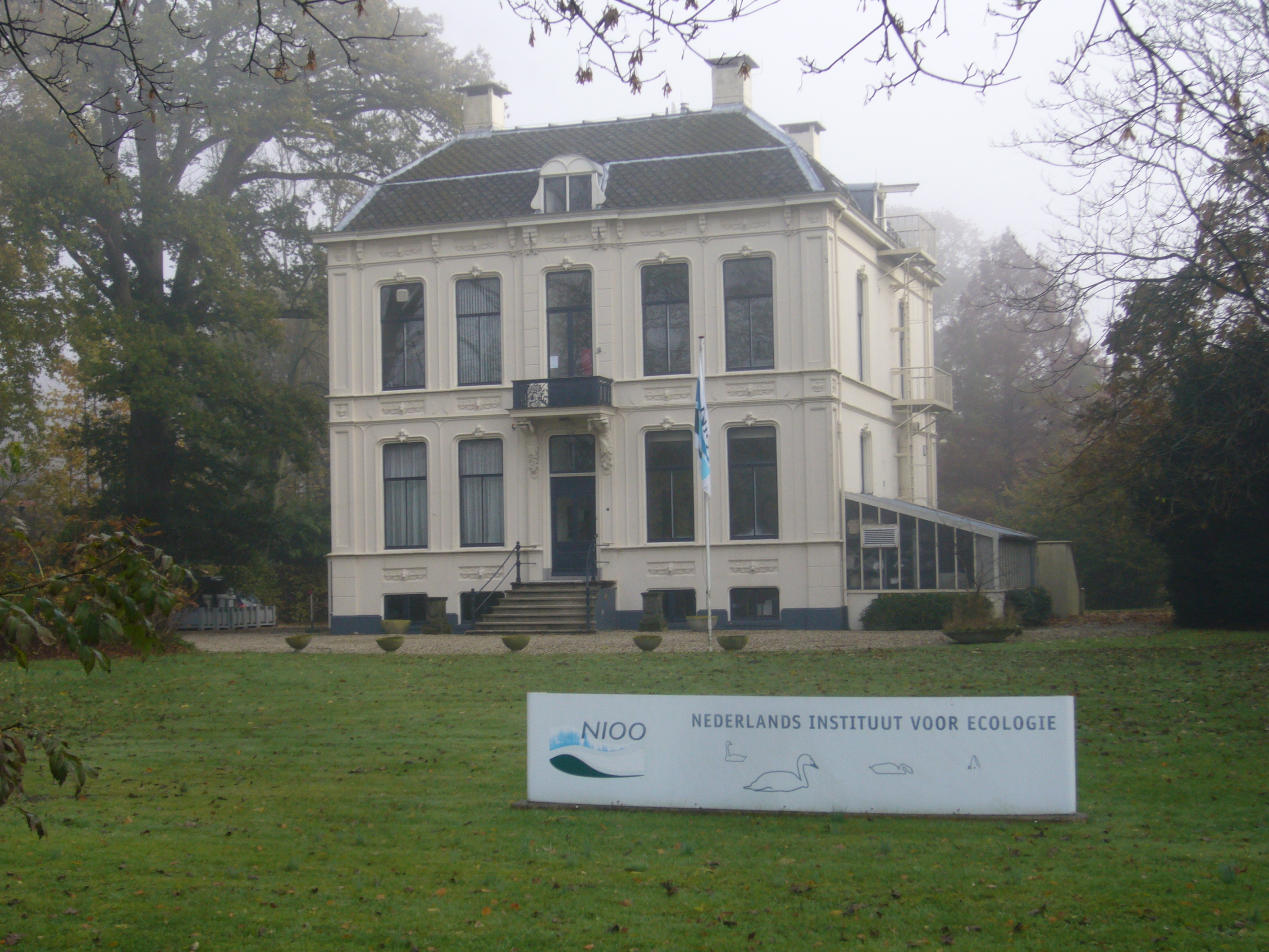 Nieuwersluis: kantoor van Ned. Instituut voor Ecologie in huis Vijverhof